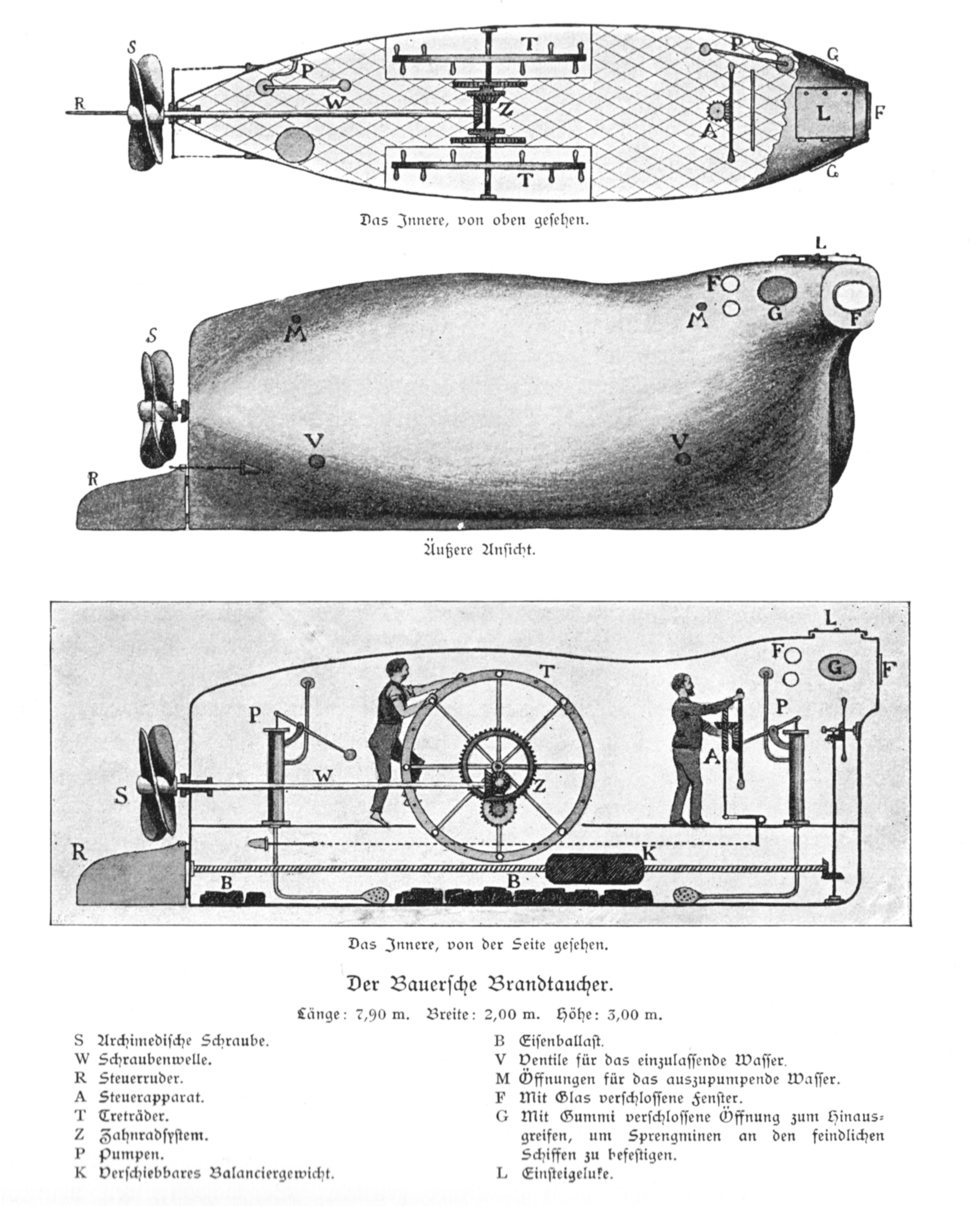 Zeichnung des Brandtauchers um 1851